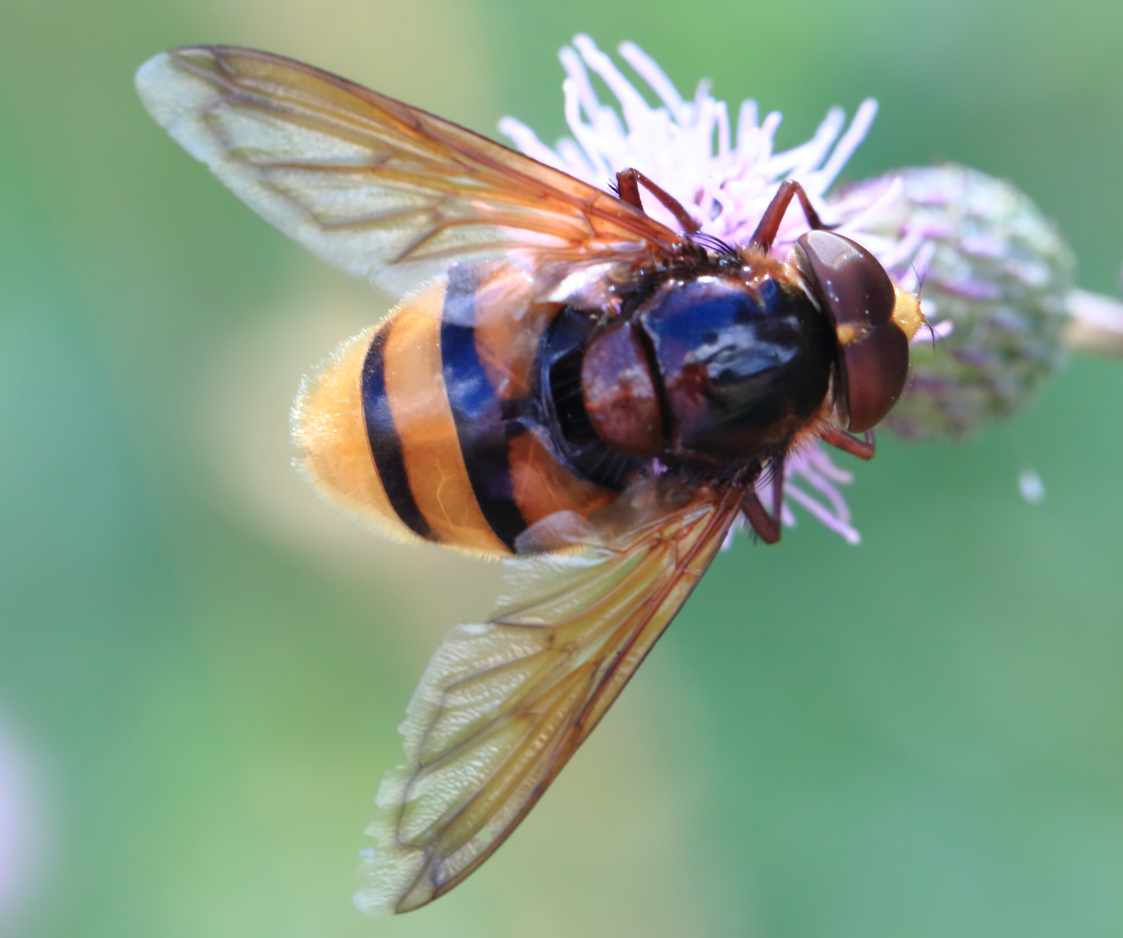 Hornissenschwebfliege, Volucella zonaria Die abgebildete Fliege wurde von mir selbst bestimmt The fly shown here has been identified by my self